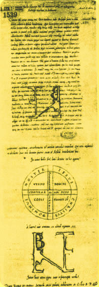 Bula Klimenta barskom nadbiskupu Petru